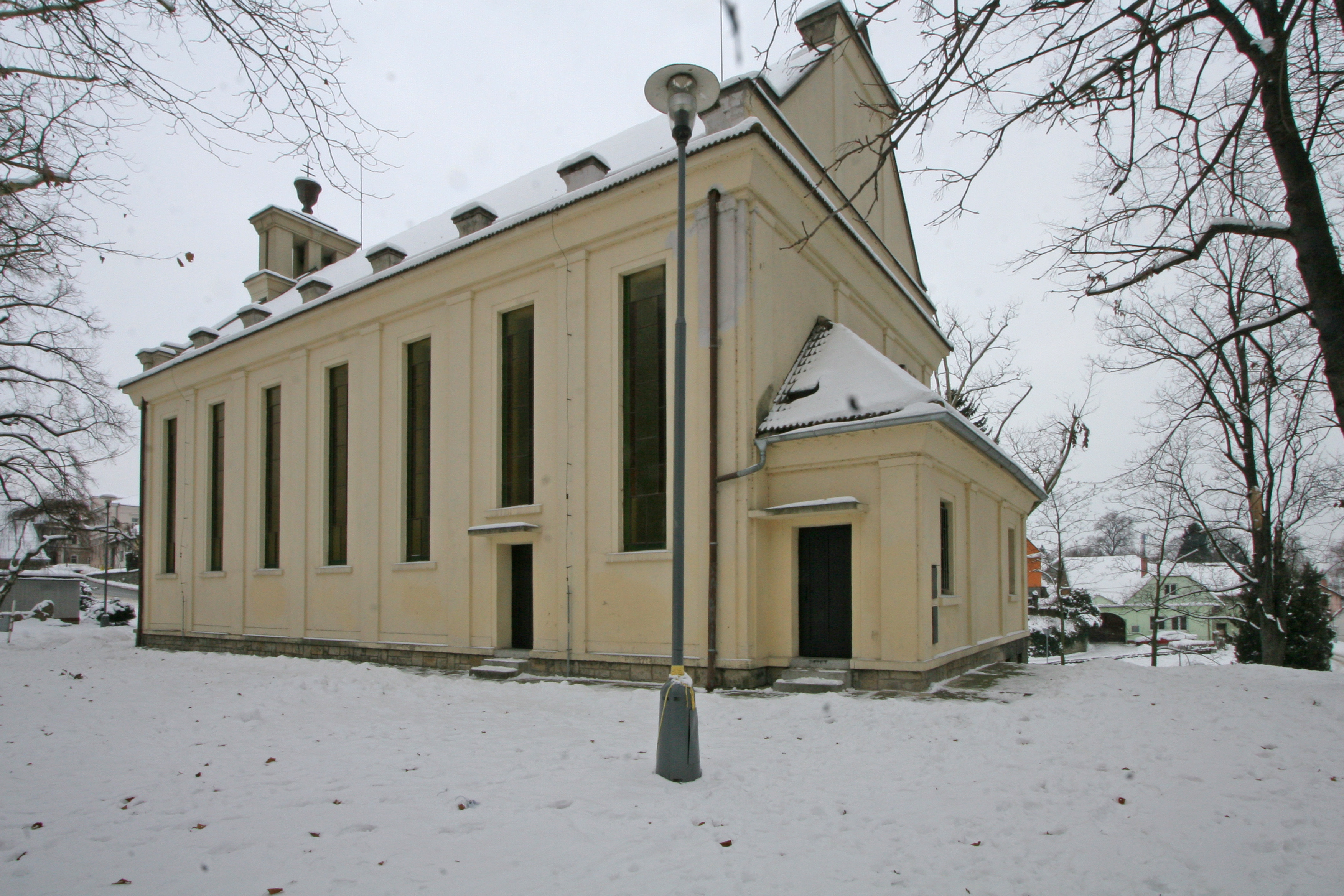 Sbor Husův (Vysoké Mýto), Hálkova, Vysoké Mýto